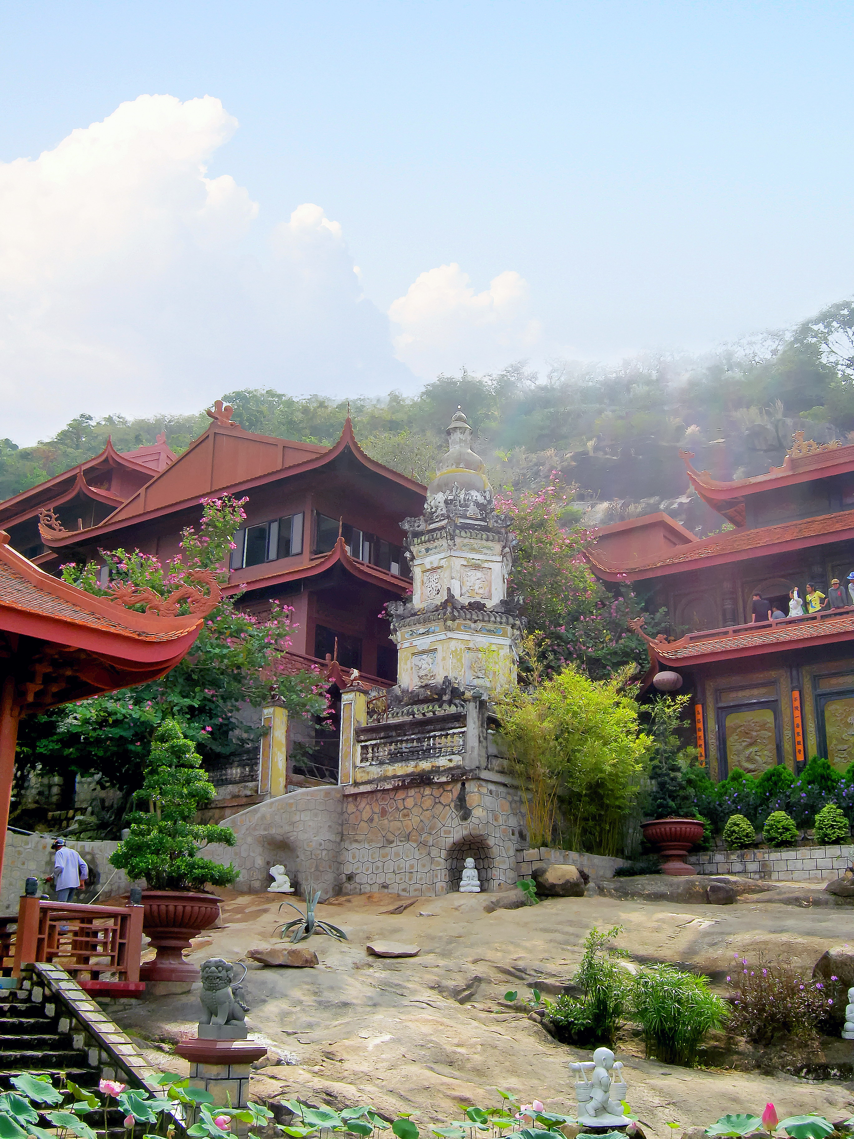 Tháp Sư bà Diệu Thiện tại chùa Hang (Phước Điền Tự) trên triền núi Sam (Châu Đốc, An Giang, Việt Nam).